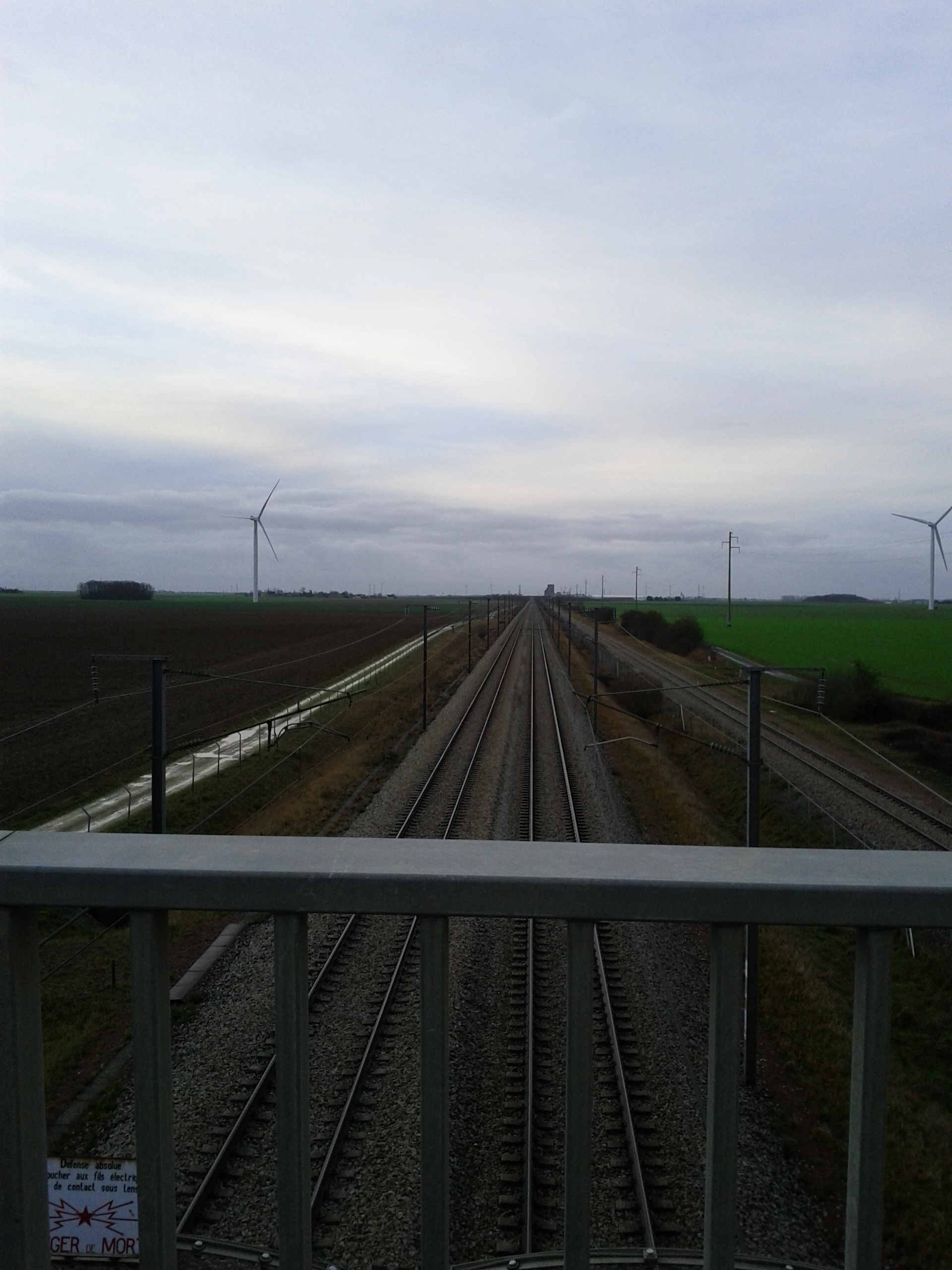 ligne de Brétigny à La Membrolle-sur-Choisille, 28150 Boisville-la-Saint-Père, Eure-et-Loir (France).